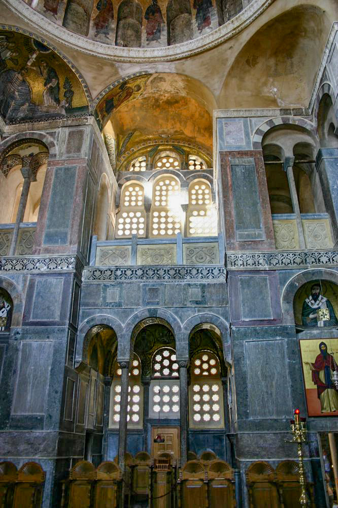 Monastère d'Osios Loukas (Grèce)